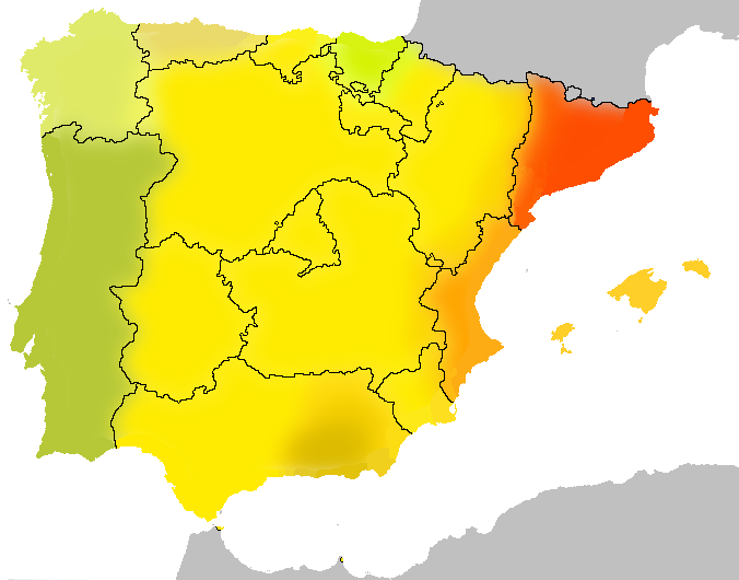 Lenguas de signos en España. La LSE en amarillo, LSC en rojo y LSCV en anaranjado, estas dos últimas así como otras variaciones en colores que se alejan del espectro del amarillo en función de su grado de diferenciación de la LSE.